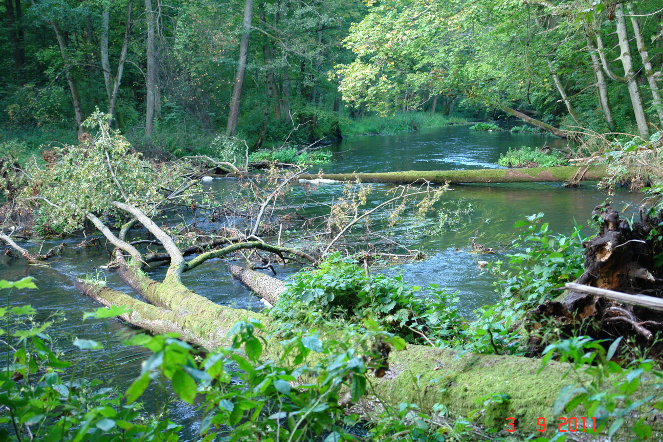 Dolna woda przy MEW Kasztanowo.